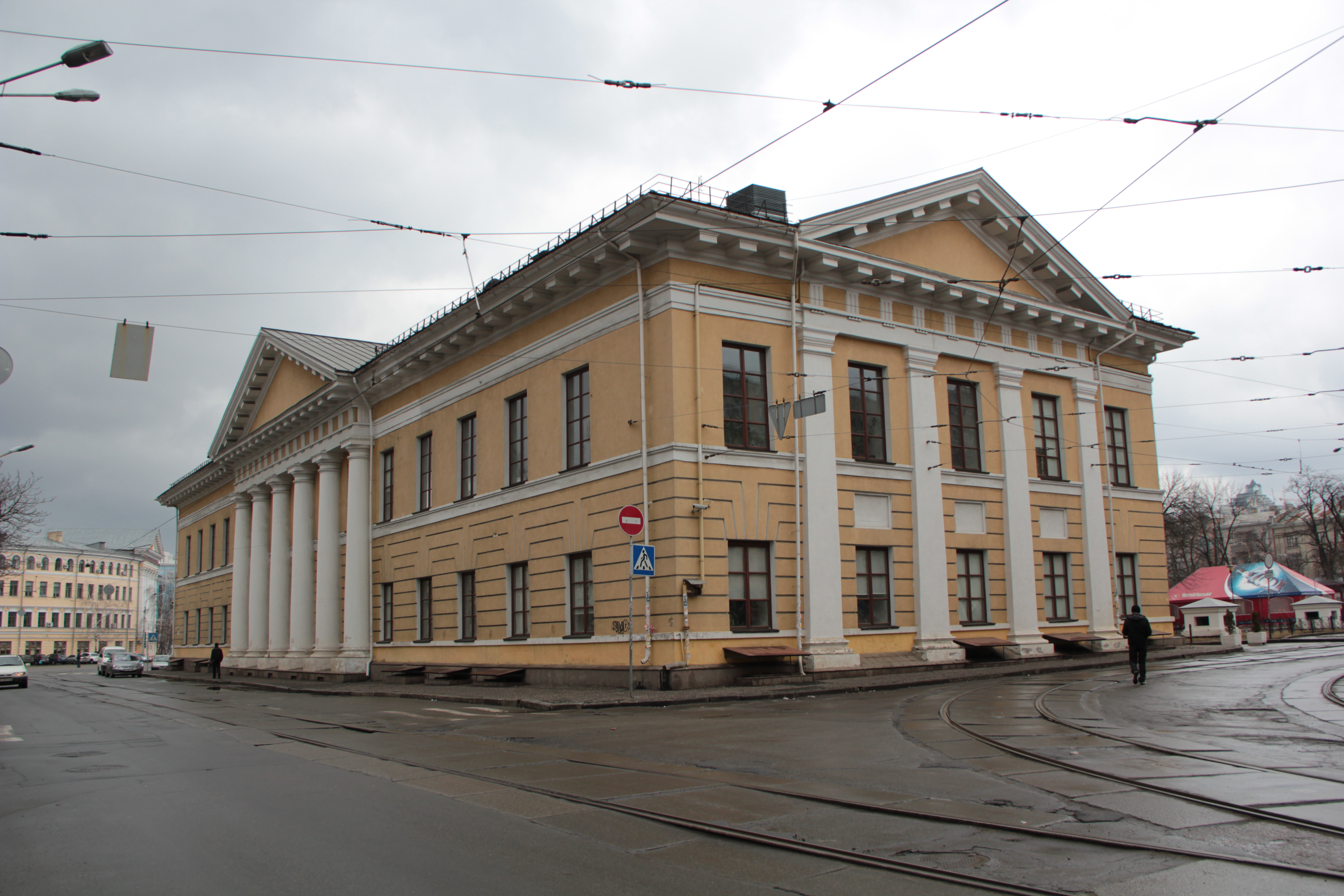 Будинок контрактовий